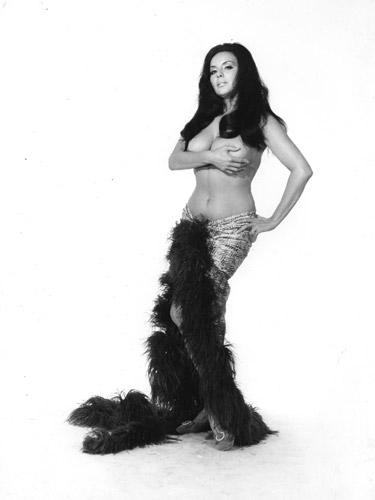 Fotografía blanco y negro sobre papel fotográfico brillante. Cuerpo entero de Isabel Sarli de frente con el torso descubierto. Imagen promocional de la película Furia infernal.